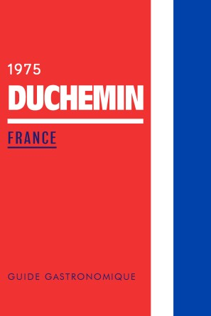 La couverture du Guide Duchemin de l'année 1975, tiré du film français L'Aile ou la Cuisse (1976).